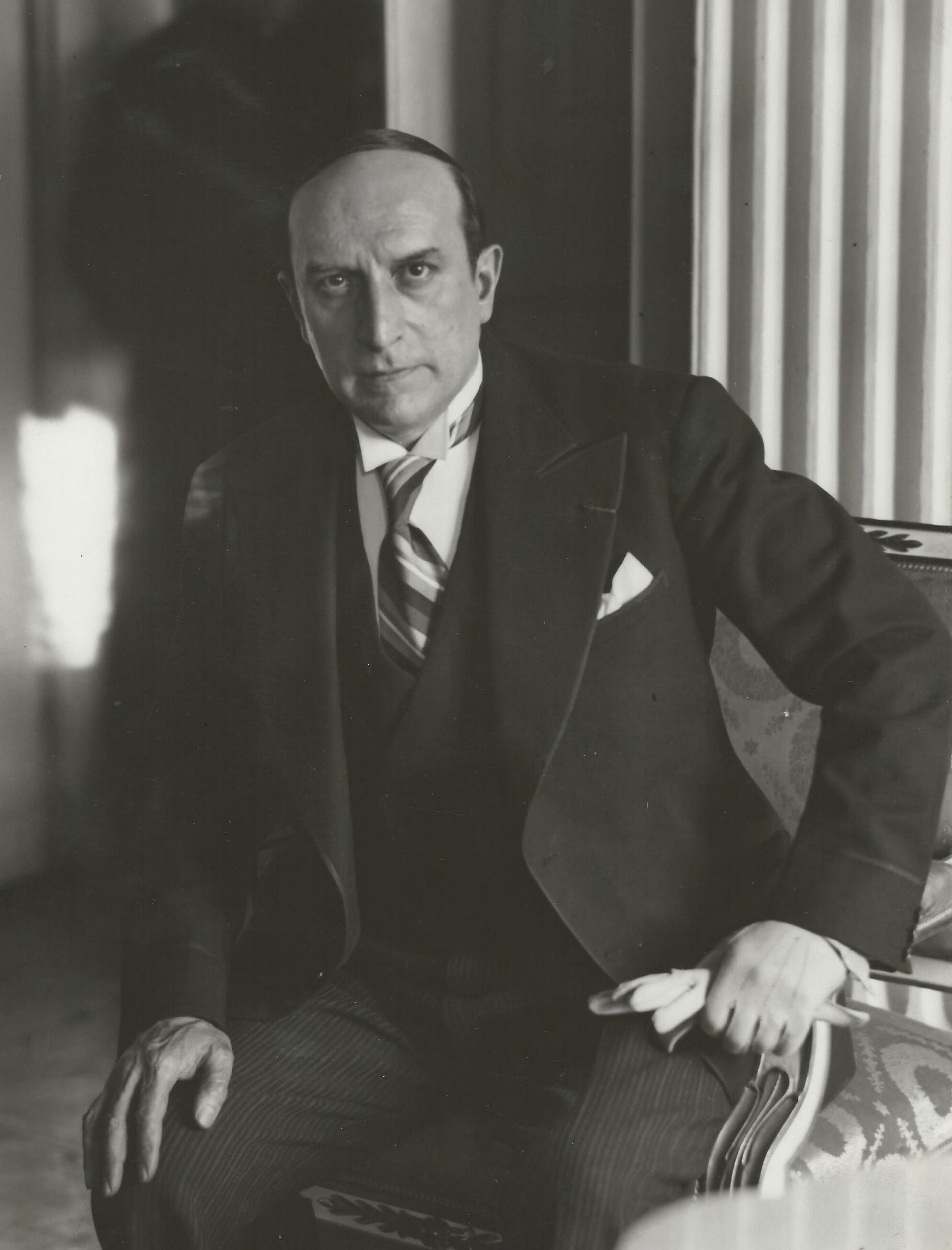 Charles Méré En 1934